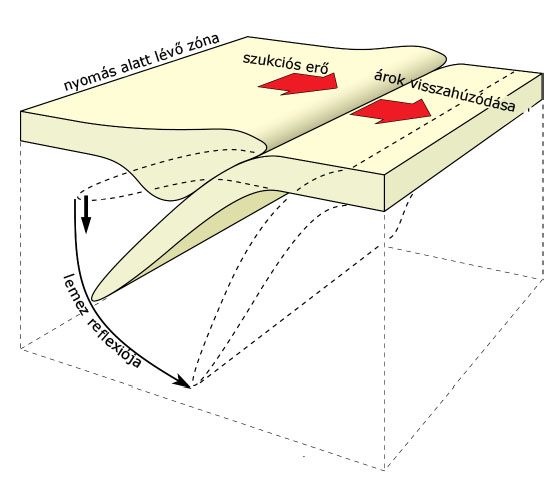 szubdukció folyamat